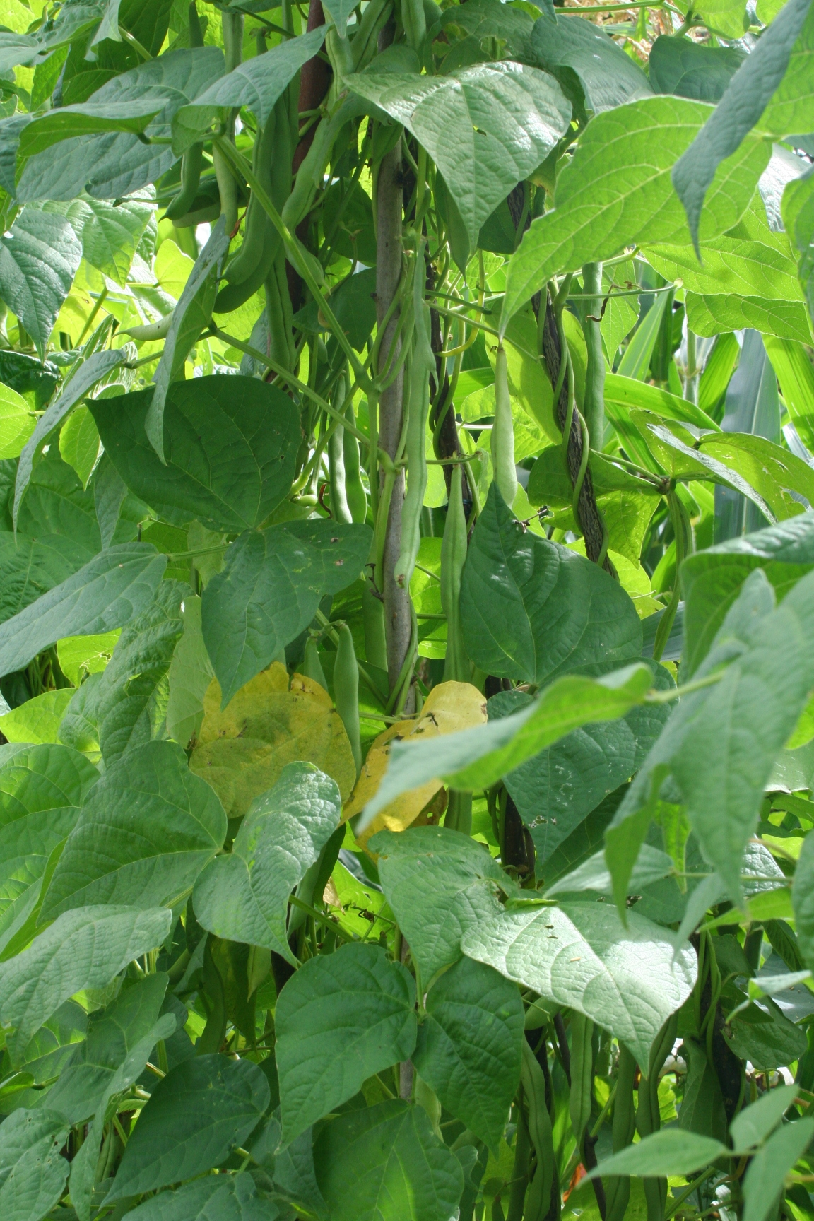 Haricots grimpants variété phénomène (Phaseolus vulgaris)